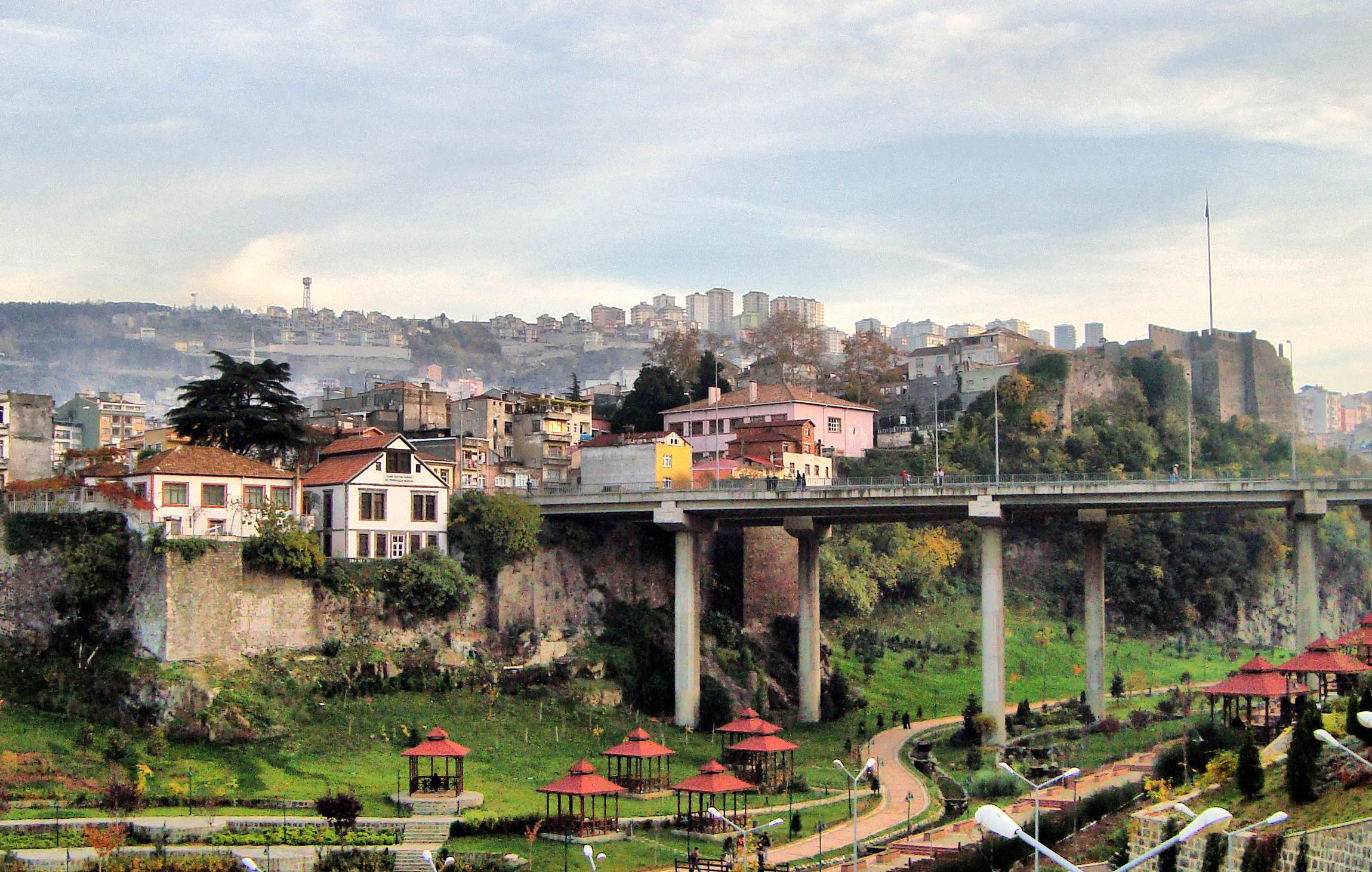 Trabzon